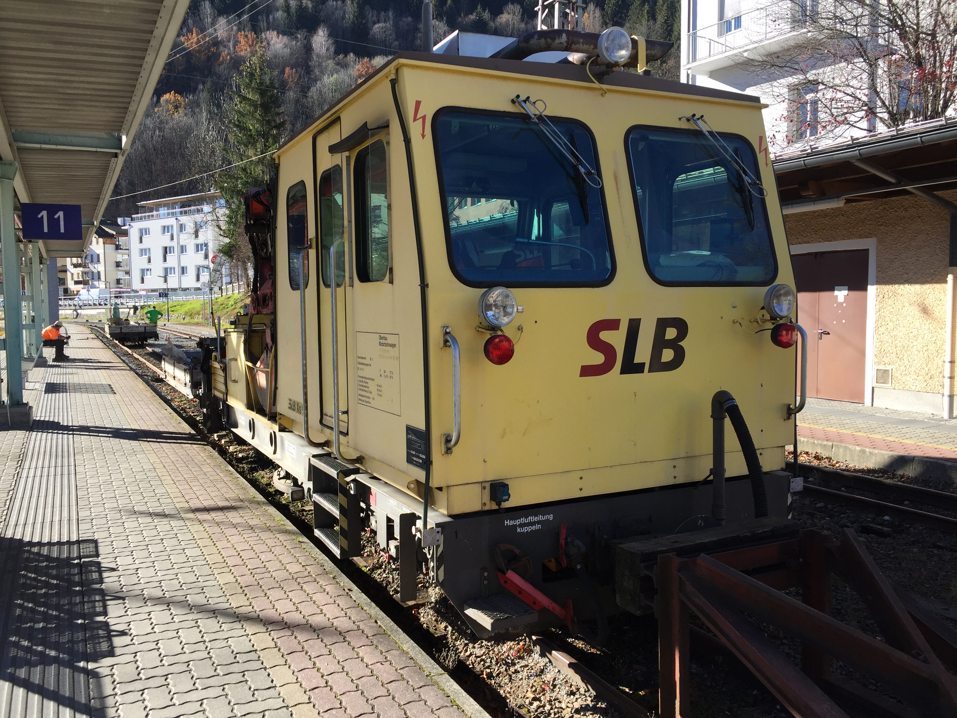 SLB Xs 91 (ex ÖBB X629.902) am Bahnsteig 11, Bahnhof Zell am See. 12. November 2018